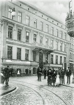 Hartungssche Zeitung in Königsberg